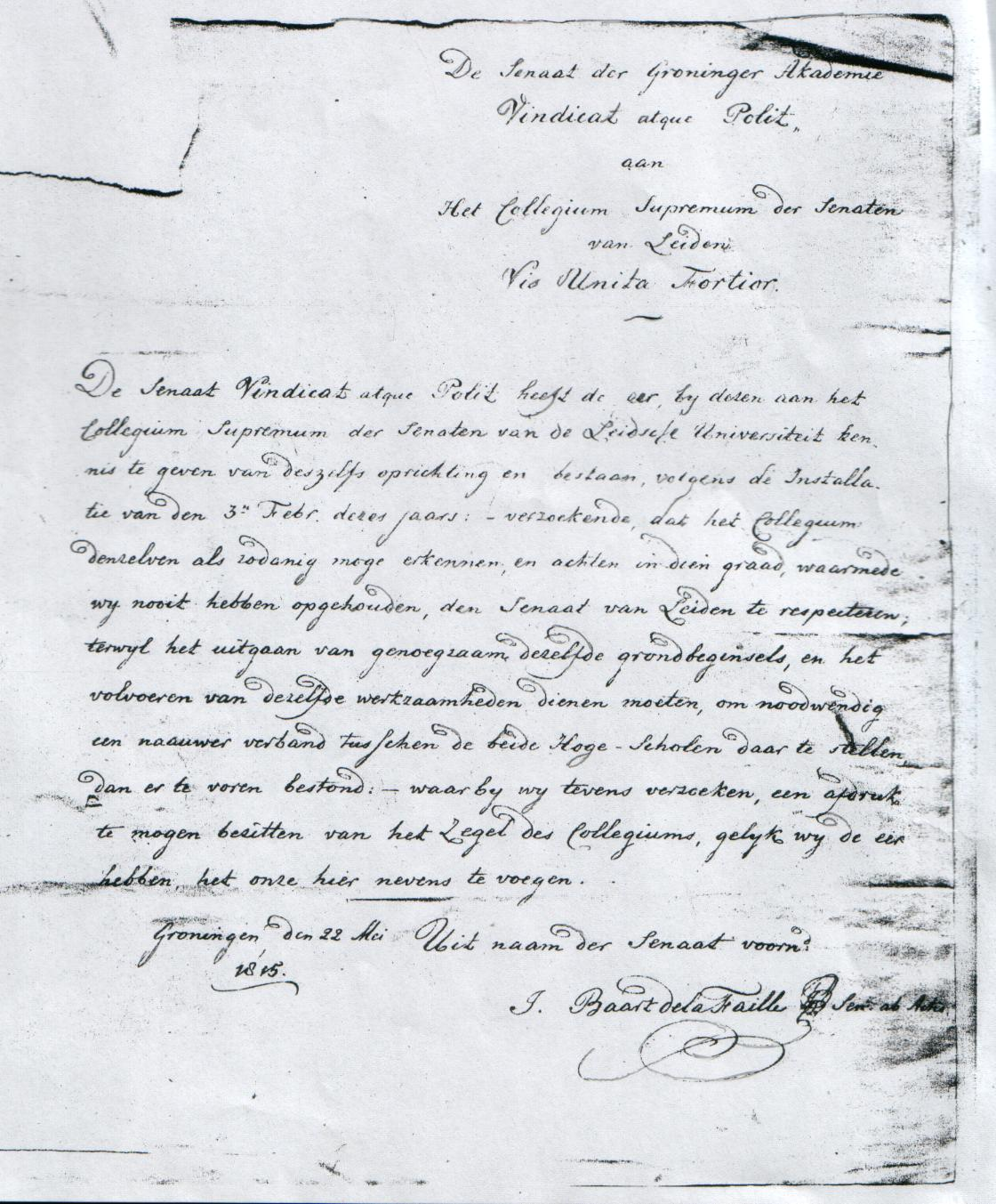 Geloofsbrief van de Senaat 'Vindicat atque Polit' te Groningen aan het Collegium 'Vis Unita Fortior' te Leiden van 22 mei 1815